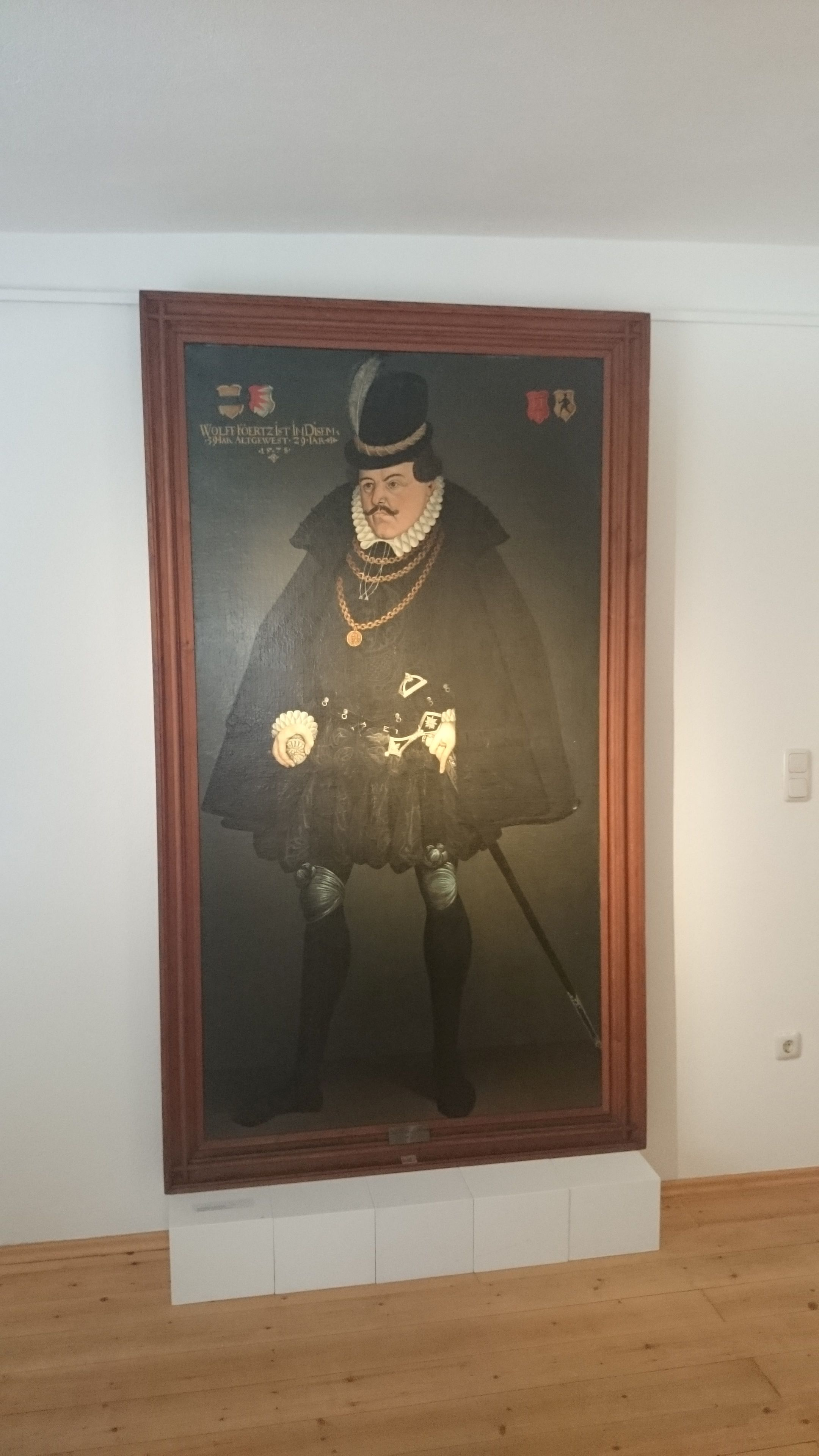 Porträt des Wolf Förtsch (1578) aus den Giech'schen Sammlungen. Ausstellung im Töpfermuseum Thurnau 2016